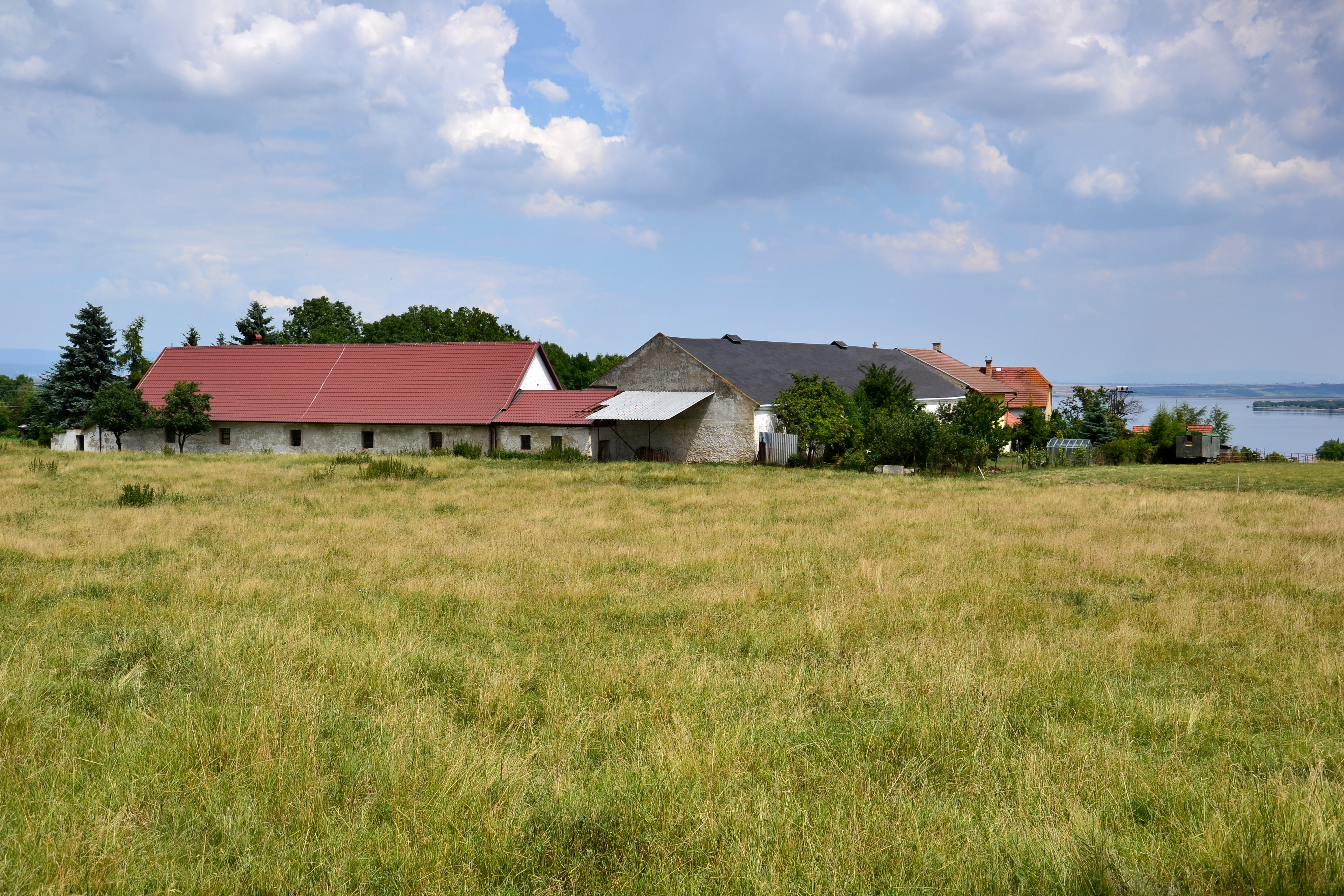 Hořenice - statek